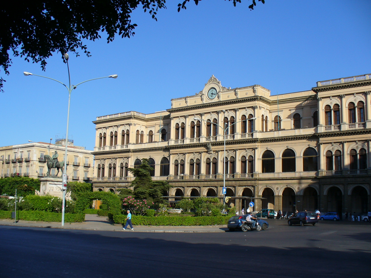 "Praça da Estação" de Palermo